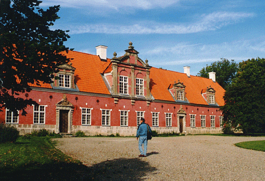 Fiholmen Jader